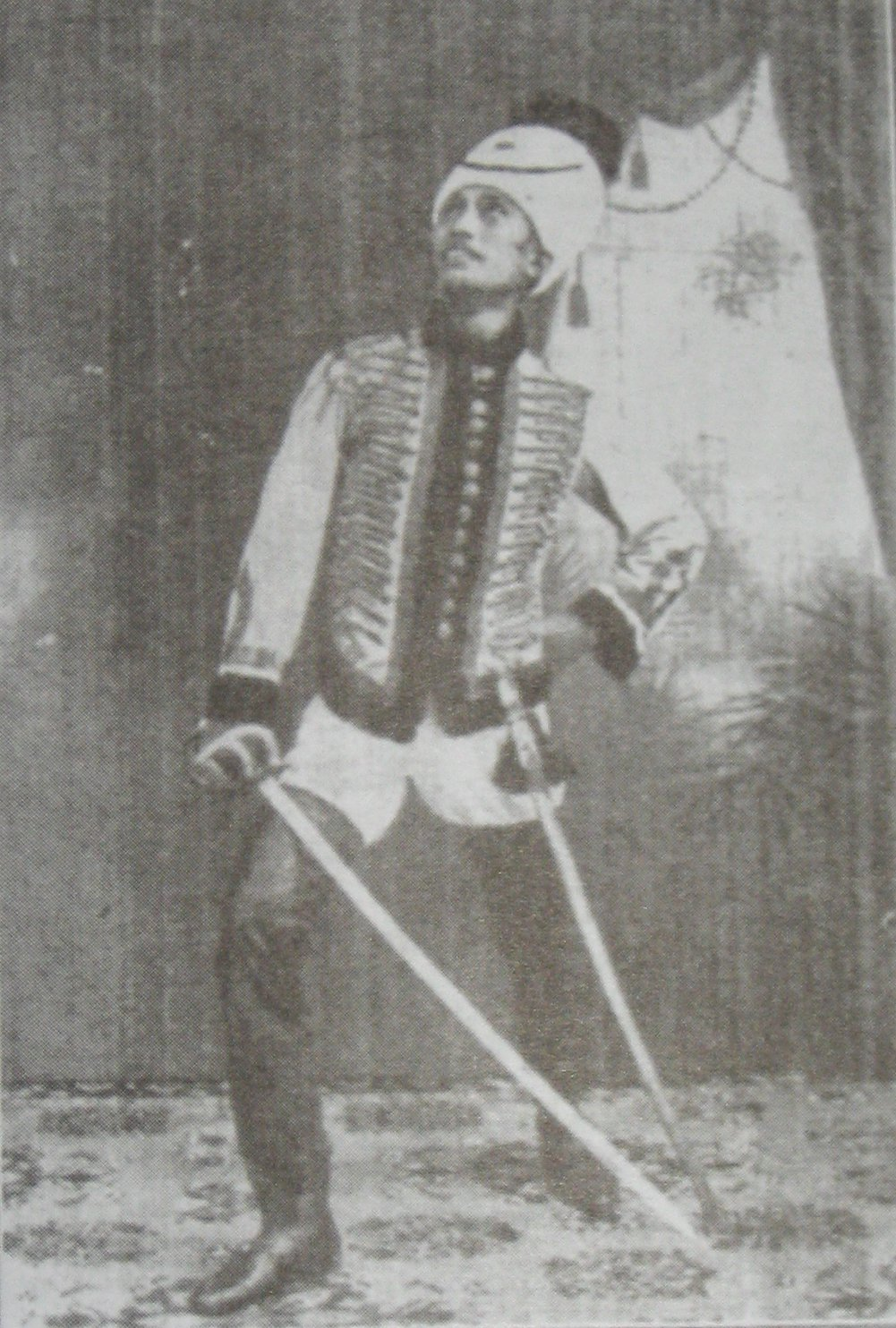 Actor Astaman